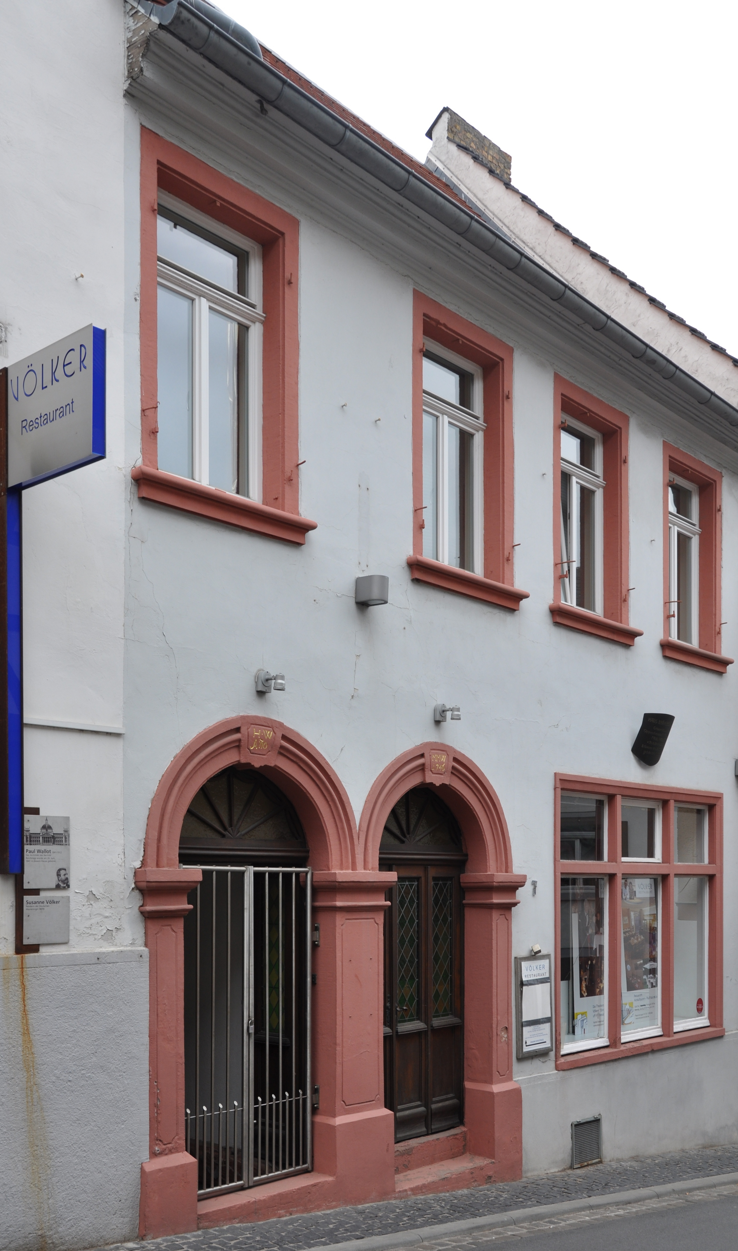 Oppenheim, Haus Krämerstraße 7, Geburtshaus des Architekten des Berliner Reichstagsgebäudes, Paul Wallot (* 26. Juni 1841); heute Restaurant Völker